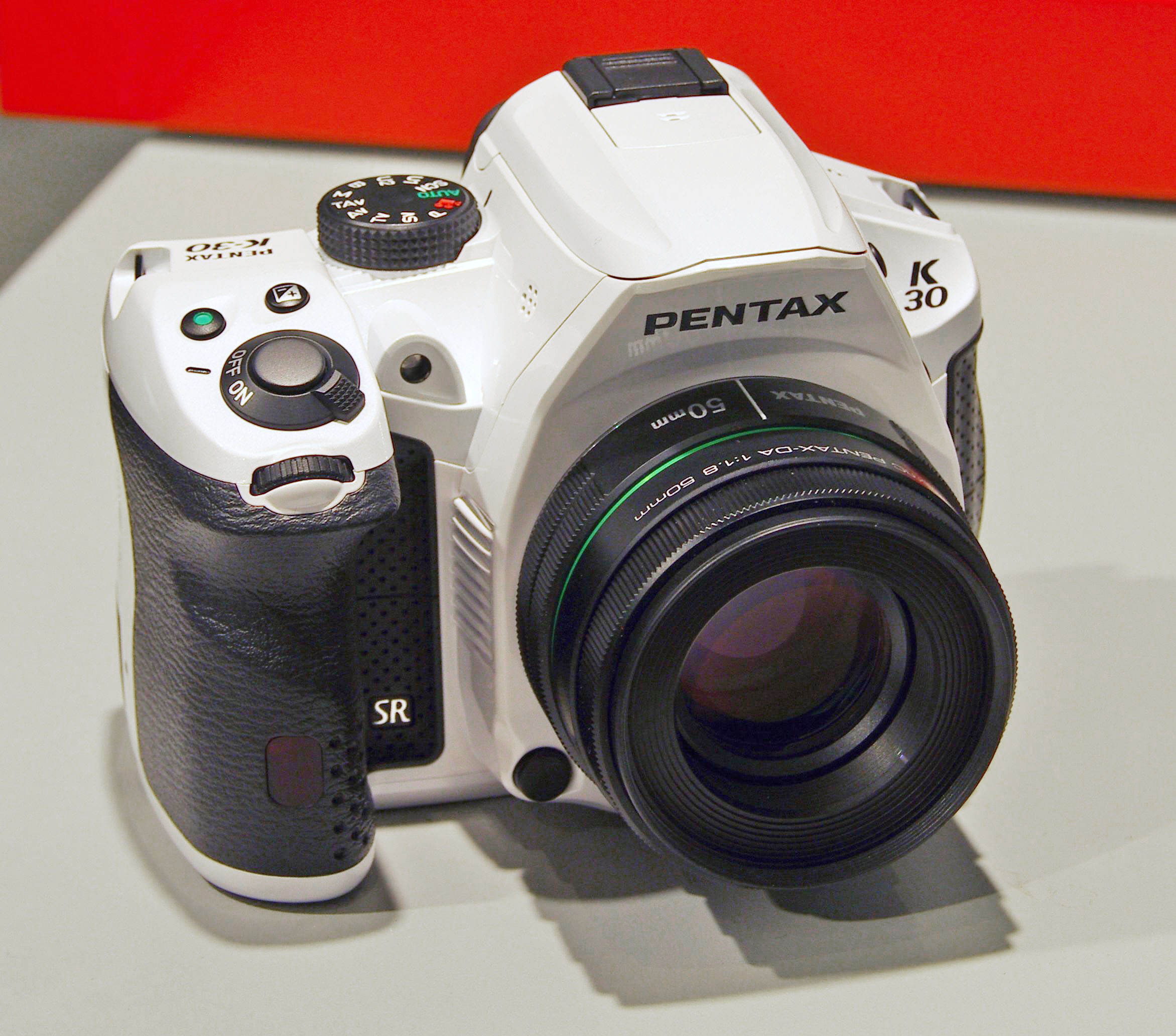 Pentax K-30 in weiß mit dem DA 50mm